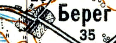 Топографическая карта Ленинградской области, квадрат Vc-29 (Батецкая), деревня Берег